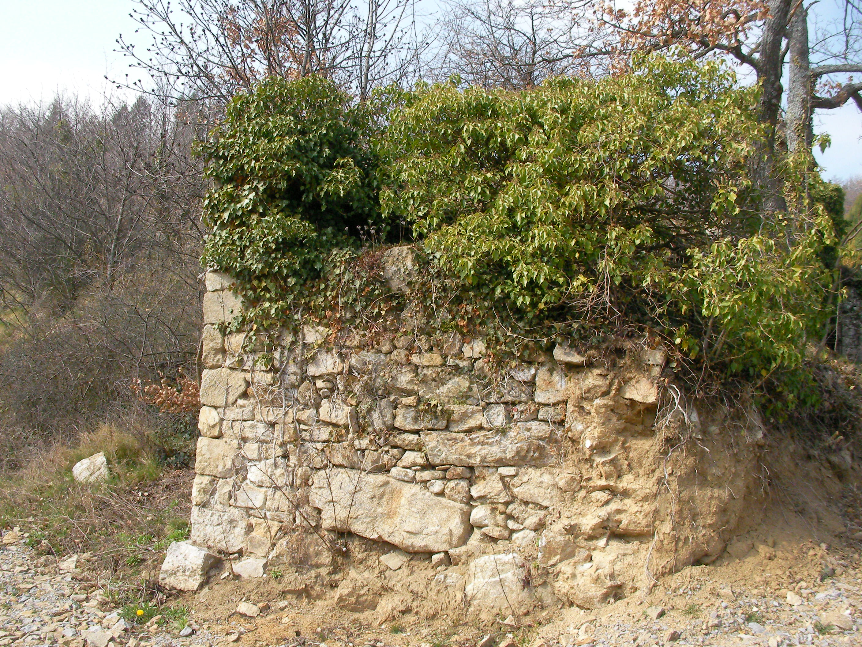 Vestige d'un des murs d'enceinte du château du Buisson (Loire).